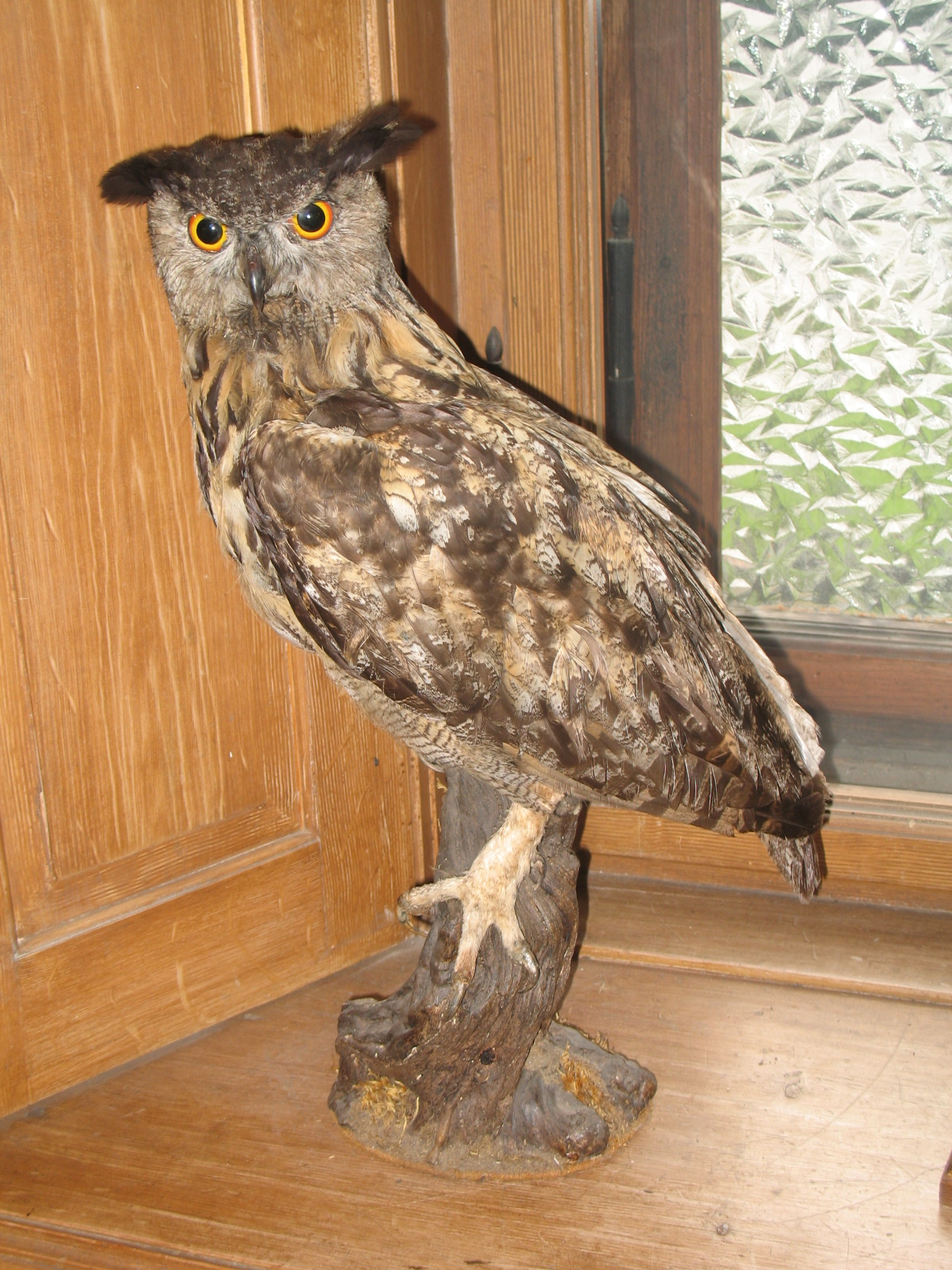 Immagine da Gressoney-Saint-Jean, Val d'Aosta - Museo Regionale della Fauna Alpina - Alpenfaunamuseum "Beck-Peccoz" - bubo bubo